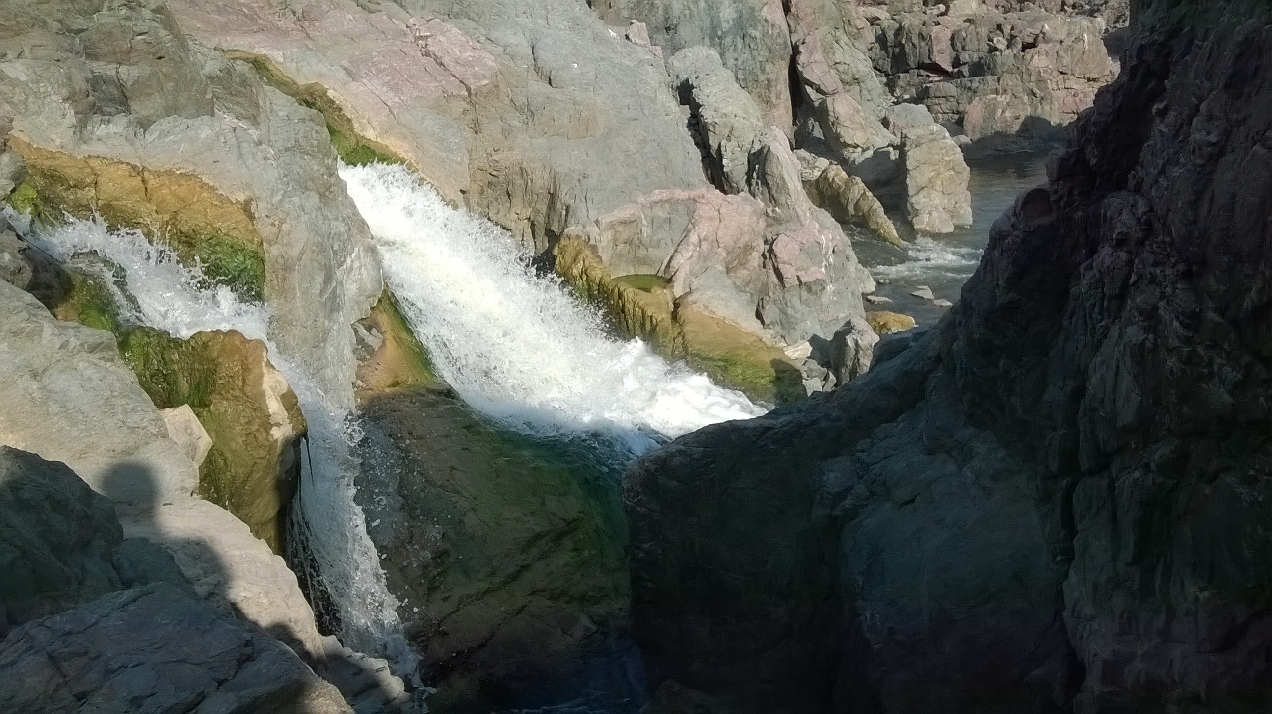 గుండాల జలపాతం (ఉపరితలం నుండి)